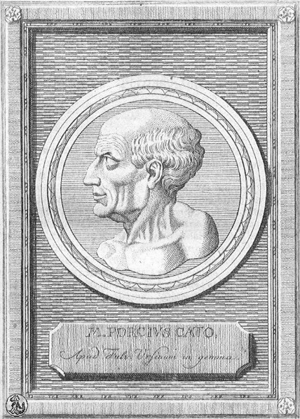 Marcus Porcius Cato, der Ältere aus: Genehmigung liegt vor!